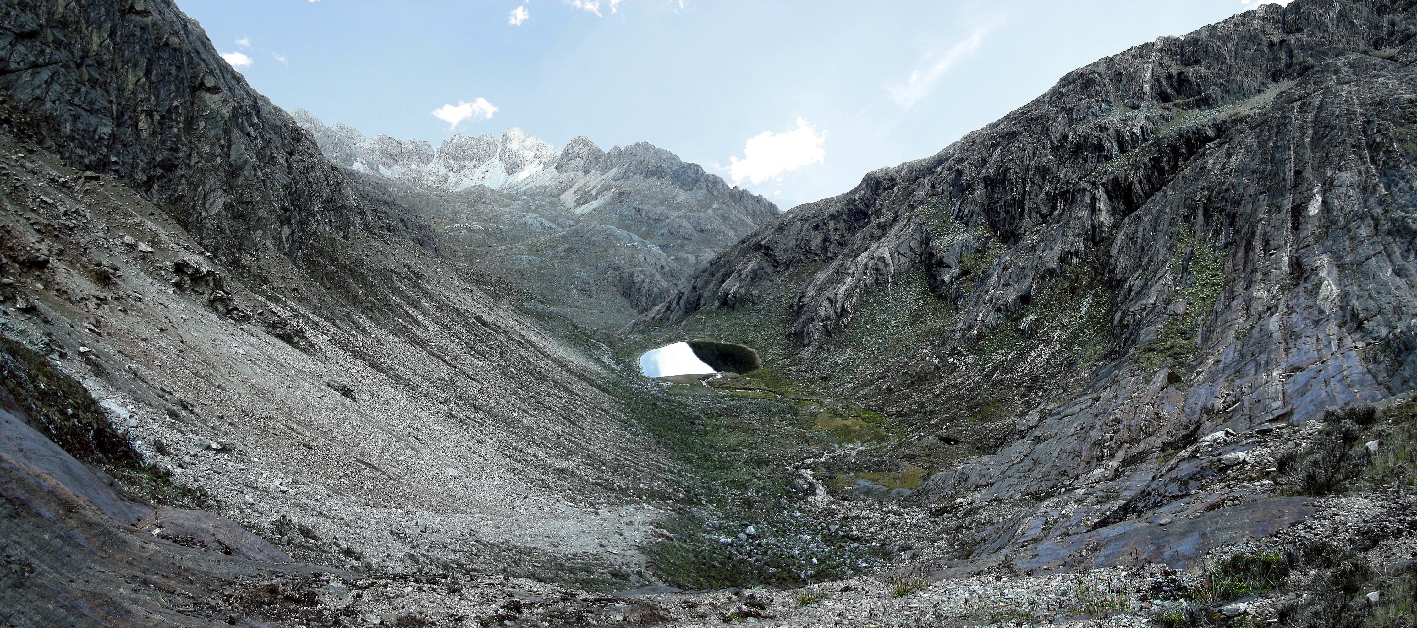 Panoramica del Valle de Laguna El Suero, Sierra Nevada, Merida, Venezuela. La fotografia fue tomada desde una cornisa en la pared de piedra creada por la morrena del extinto glacial del pico Humboldt, a aproximadamente 200 metros del suelo mas alto del Valle ubicado a 4600 msnm